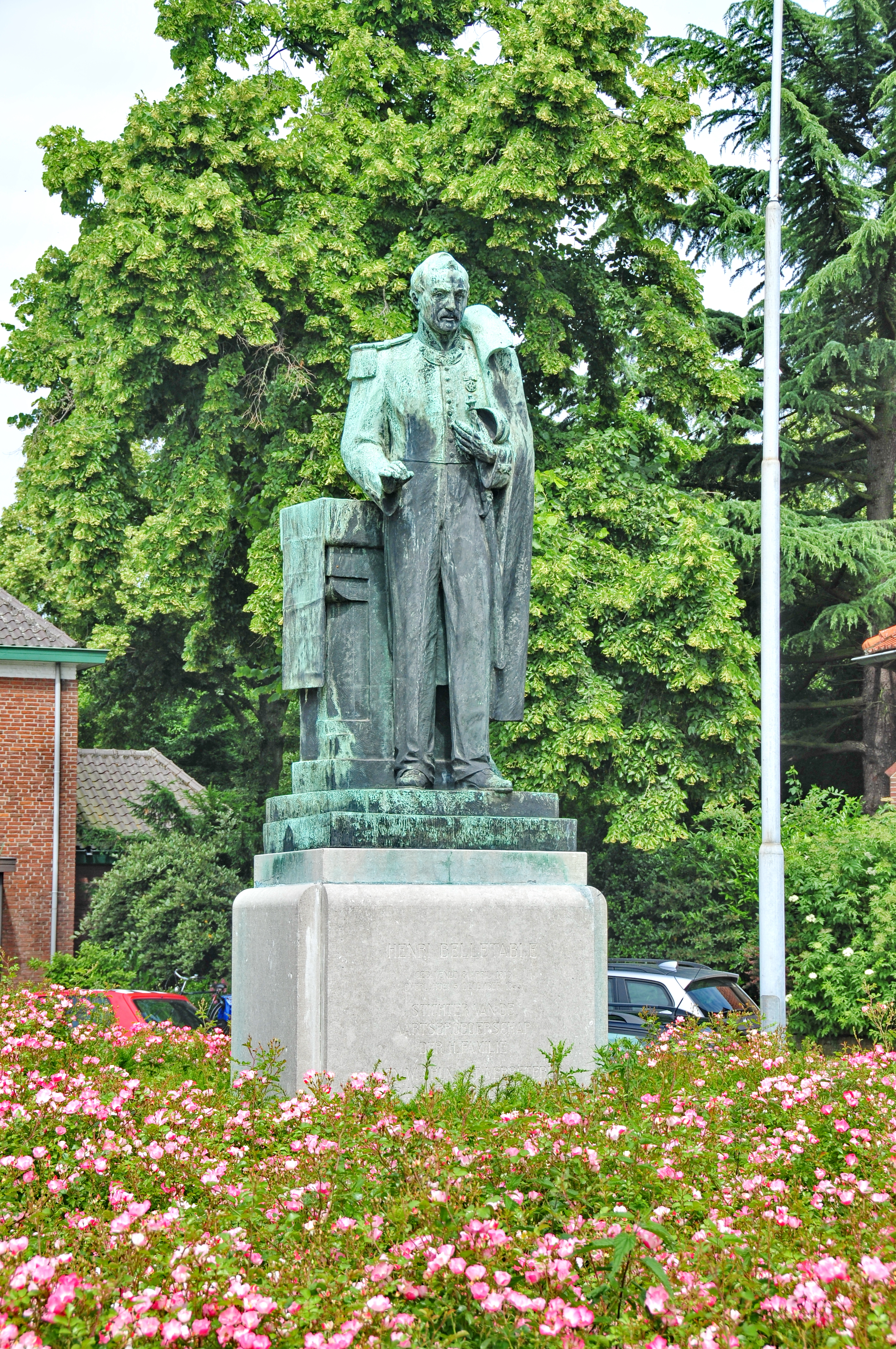 Venlo, Niederlande, 2013 Sieht alt aus, also vorsichtshalber aufnehmen. 50 mm sind dafür fast ideal. Es ist Henri Belletable, ein niederländischer und belgischer Offizier. Er gilt als Begründer der Kirche, vor der das Denkmal steht.